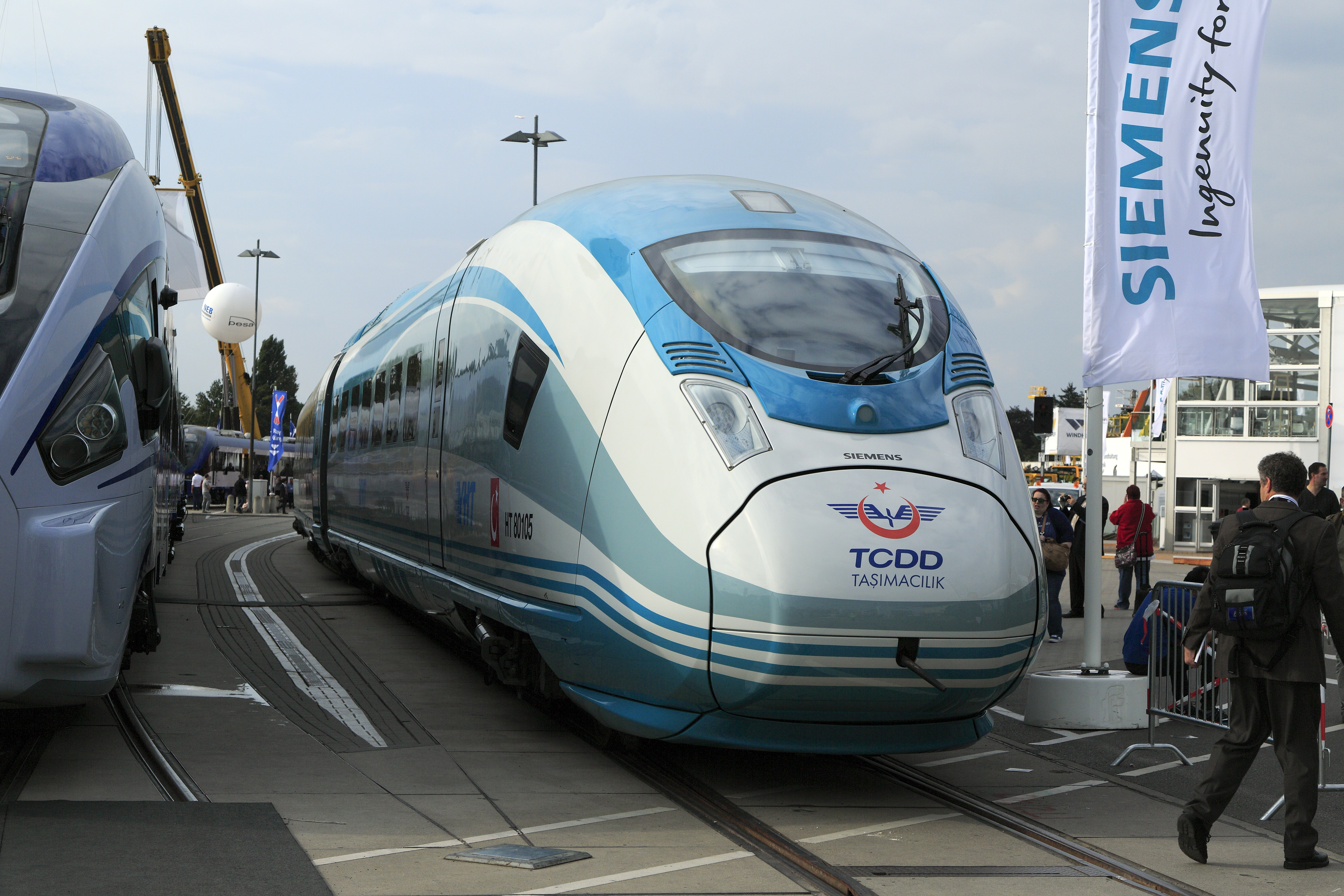 Hochgeschwindigkeitstriebzug für die Türkischen Staatsbahnen TCDD, gegenüber den deutschen Einheiten der Reihe 407 nur wenig verändert. Als Zugbeeinflussung ist nur ETCS eingebaut, die Einheiten sind nur für 25kV mit 50Hz ausgelegt.